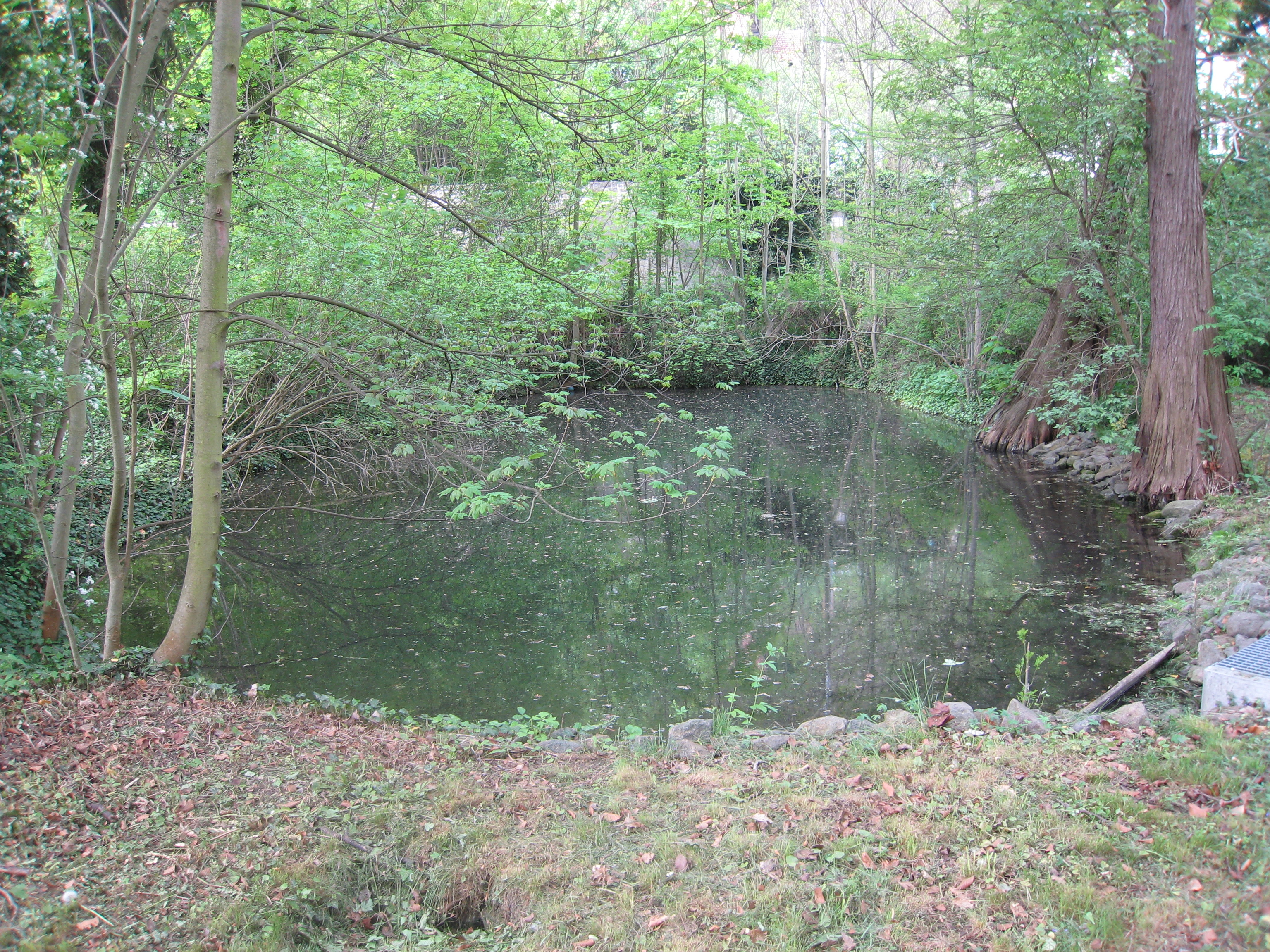 Teich im Villengarten Franz, Arnstadt